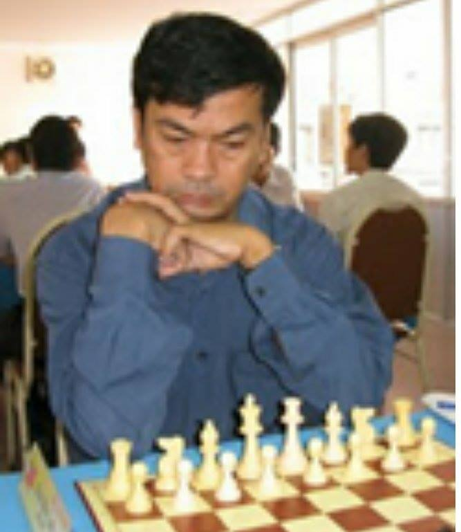 မြန်မာပြည်ရဲ့ တစ်ဦးတည်းသော Grand Master ကိုဇော်ဝင်းလေး